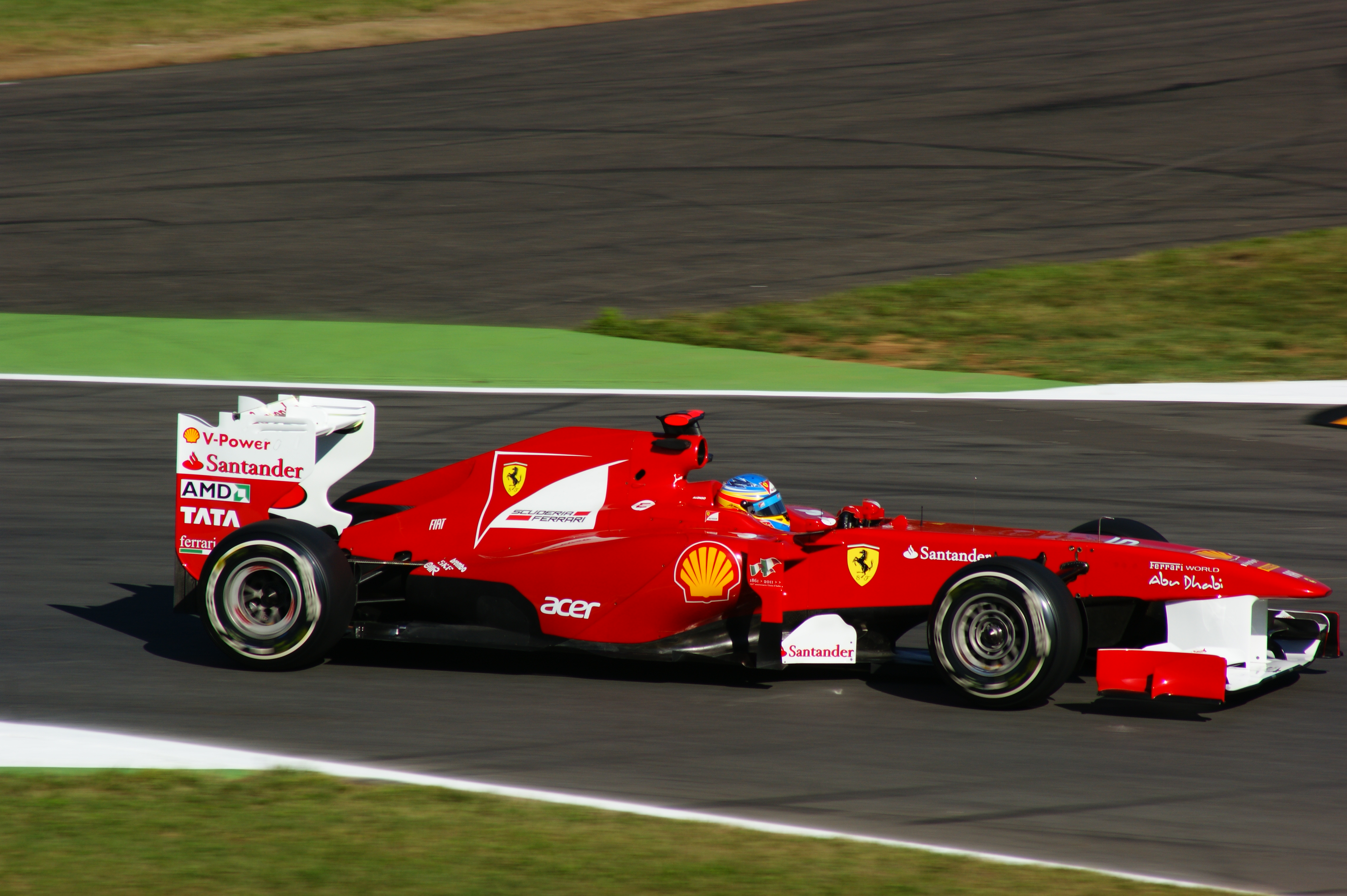 Fernando Alonso alla prima variante Monza 2011